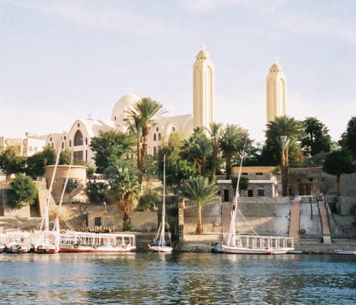 Cathédrale copte d'Assouan vue du Nil (Egypte)